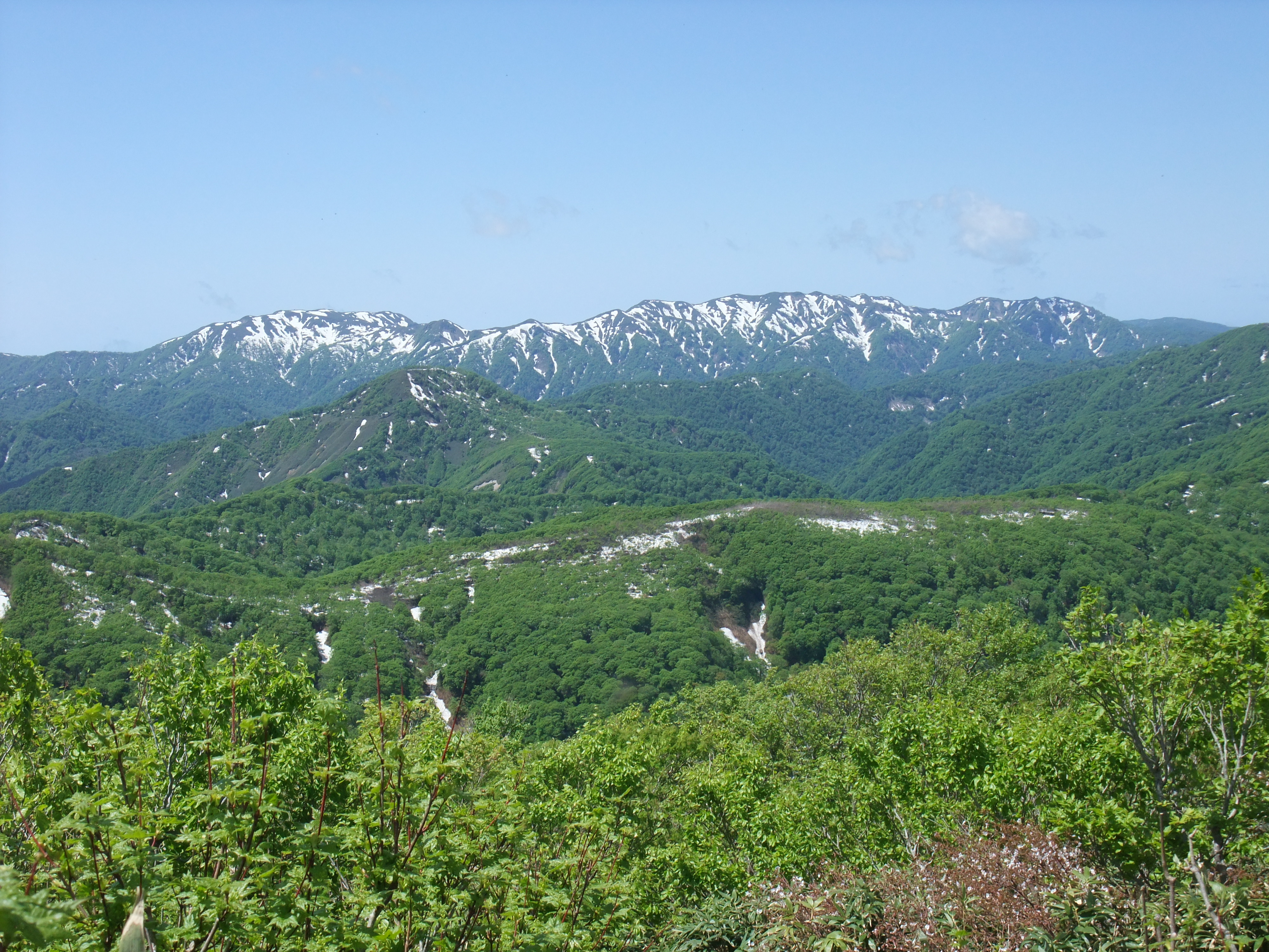 二ツ森より望む白神山地